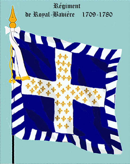 Ordonnanzfahne eines Fremdenregiments im königlich französischen Dienst. - Entnommen und überarbeitet aus: „LES UNIFORMES ET LES DRAPEAUX DE L'ARMÉE DU ROI“ Marseille 1899. (Drapeau d'Ordonnance d' un régiment etranger au service française.)